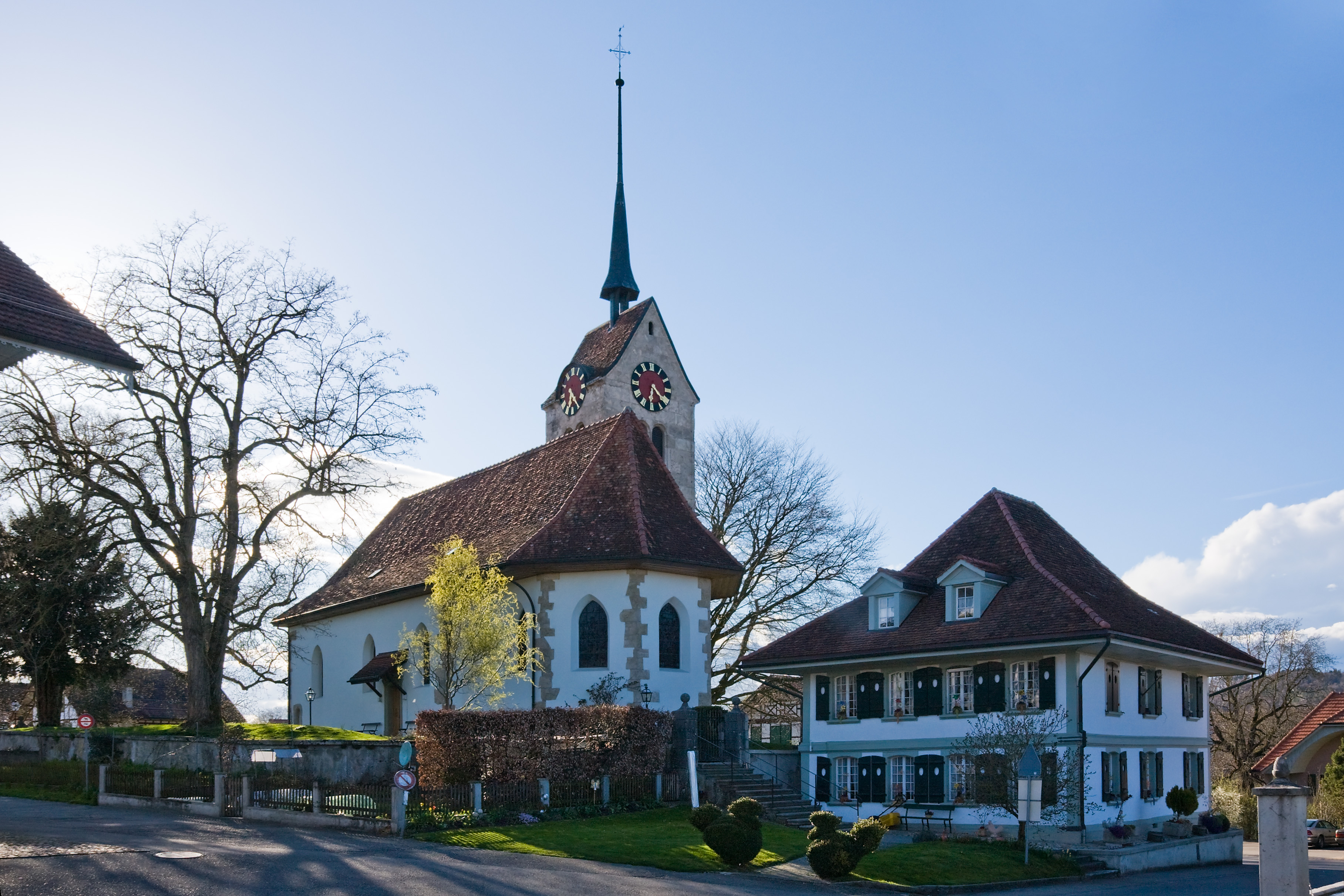 reformierte Kirche und Gemeindehaus von Messen, Kanton Solothurn, Schweiz